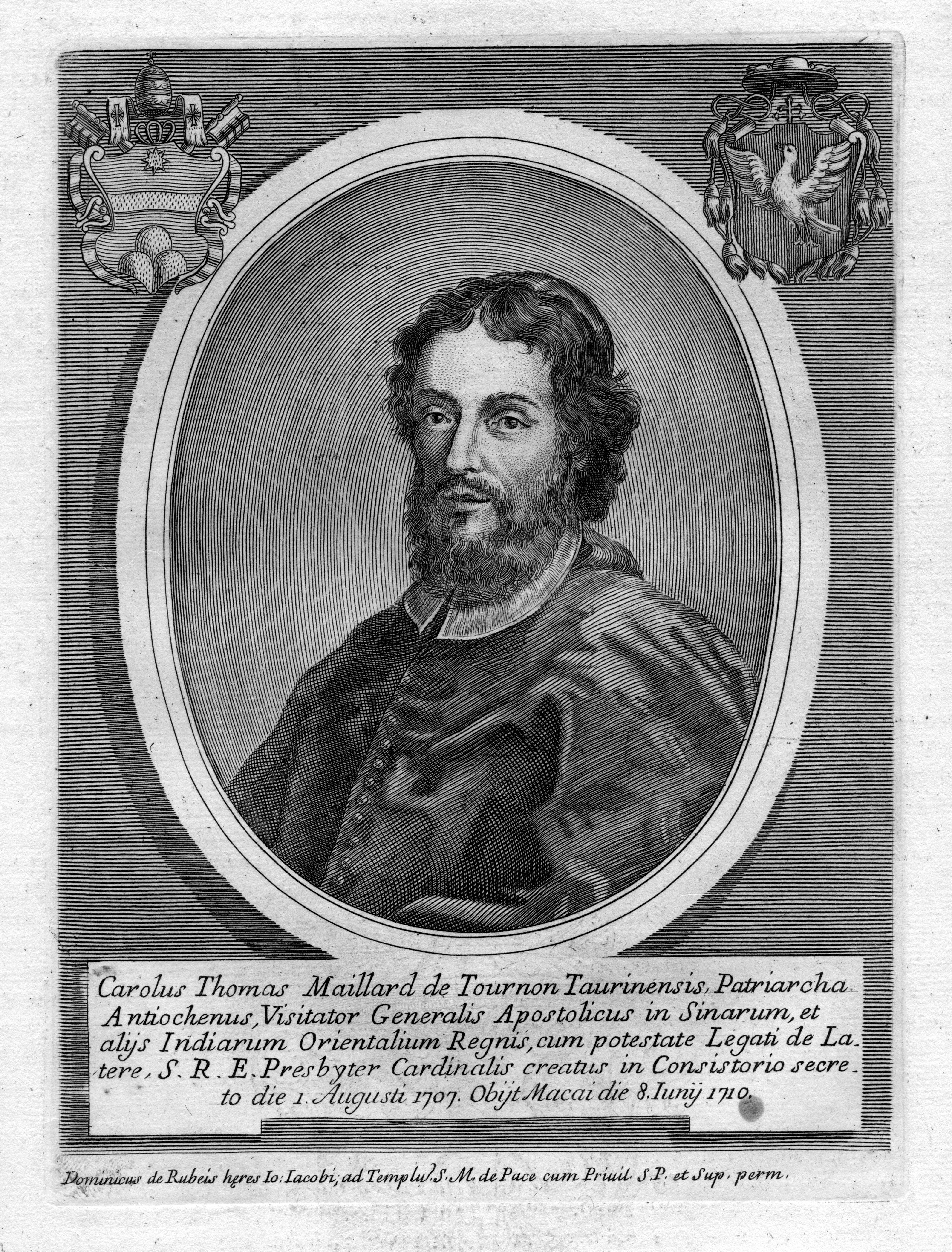 Portrait de Charles Thomas Maillard de Tournon (1668-1710)